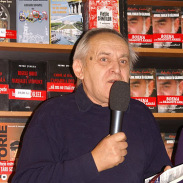 Foto Silviu Guga